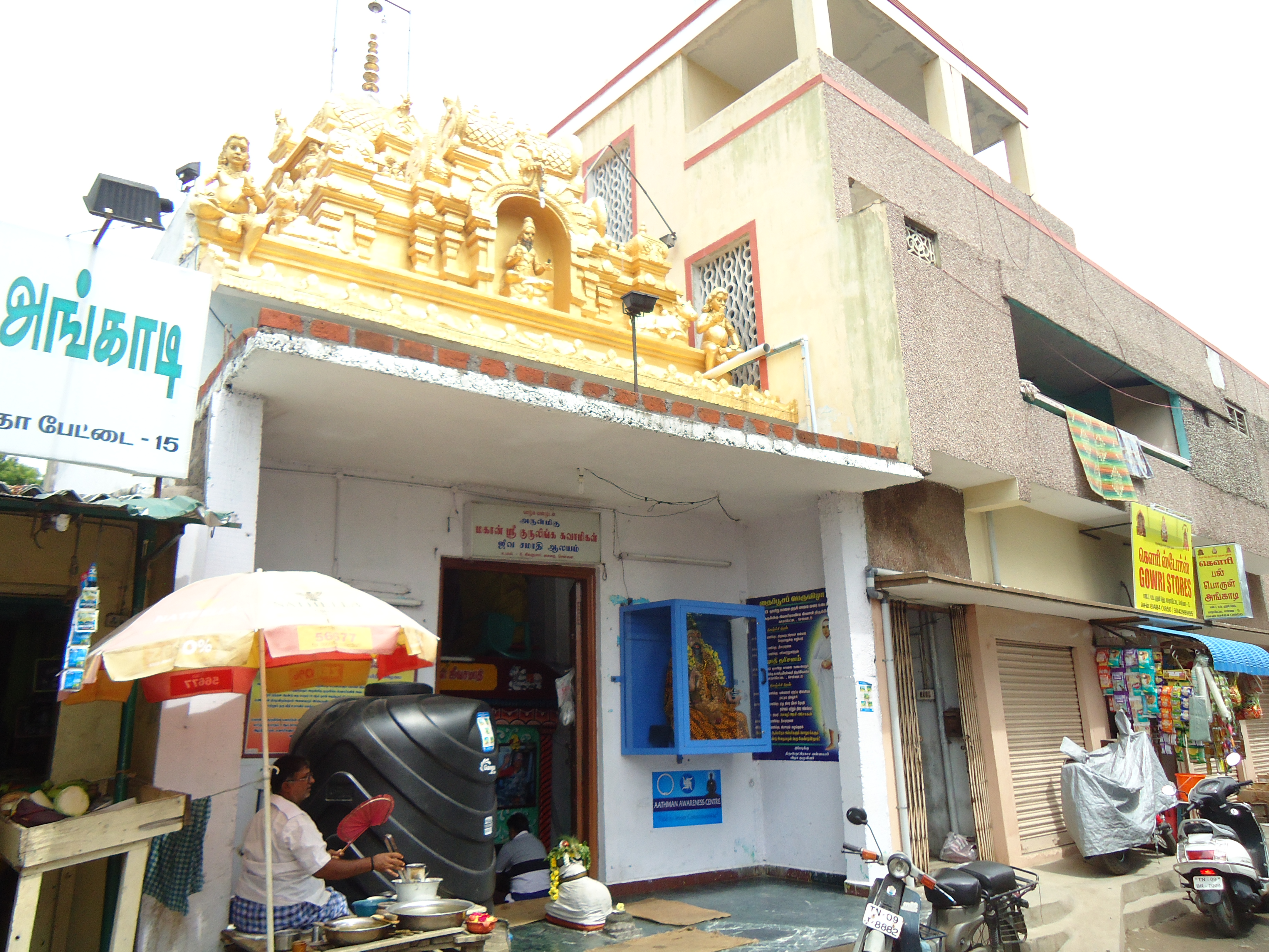 சைதாப்பேட்டை குருலிங்க சாமிகள் ஜீவசமாதி கோயில்